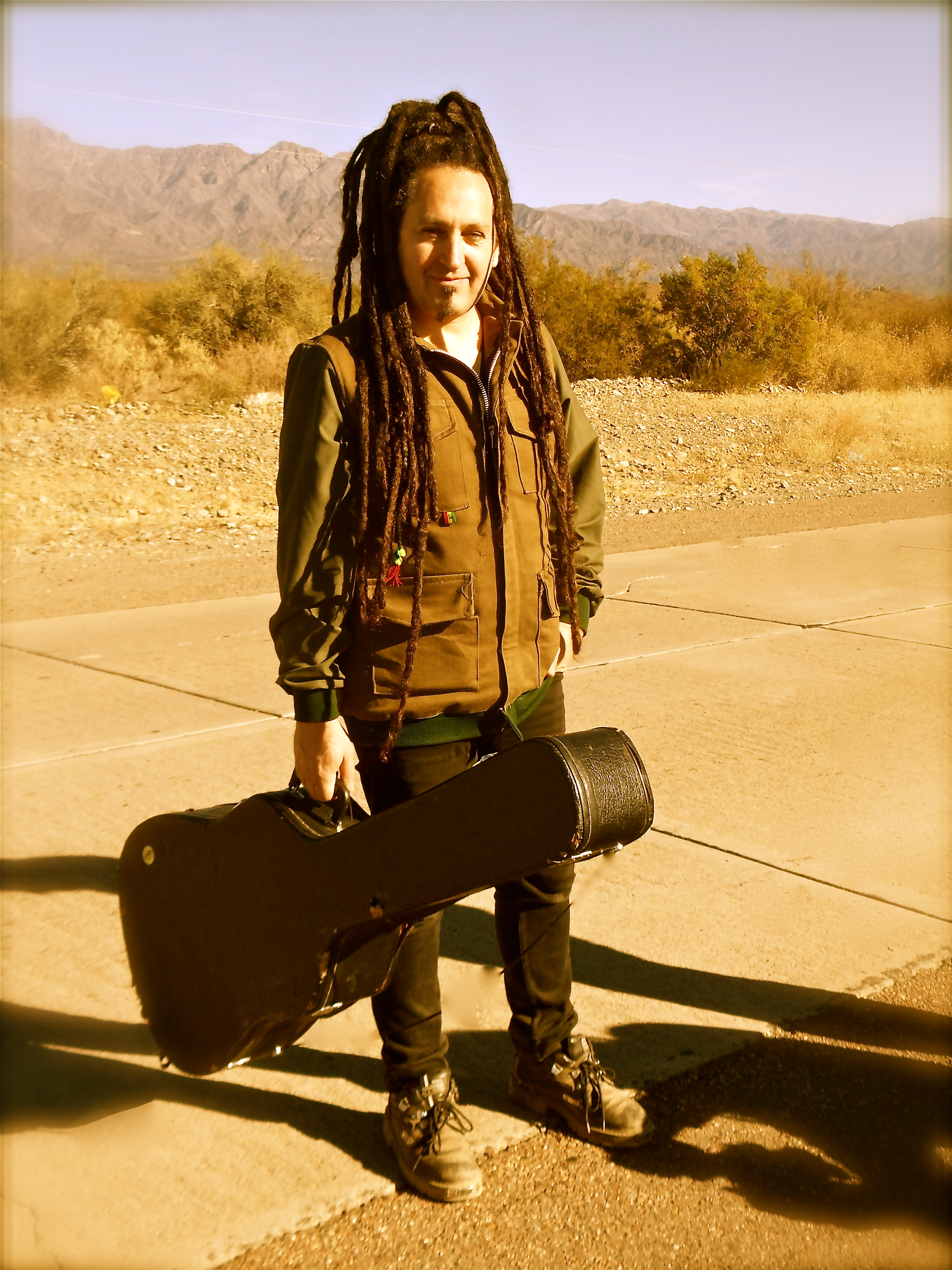 Goy Karamelo en Villavicencio